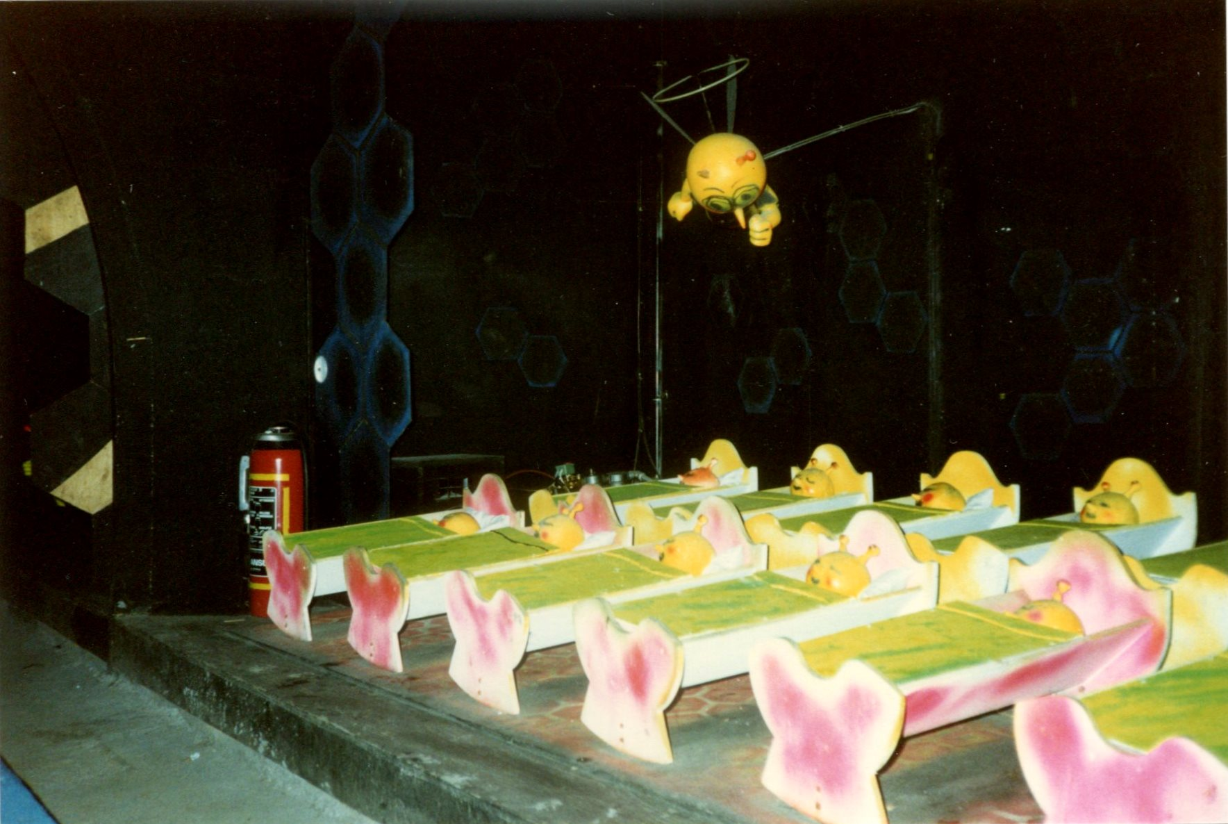 MeliparkApirama